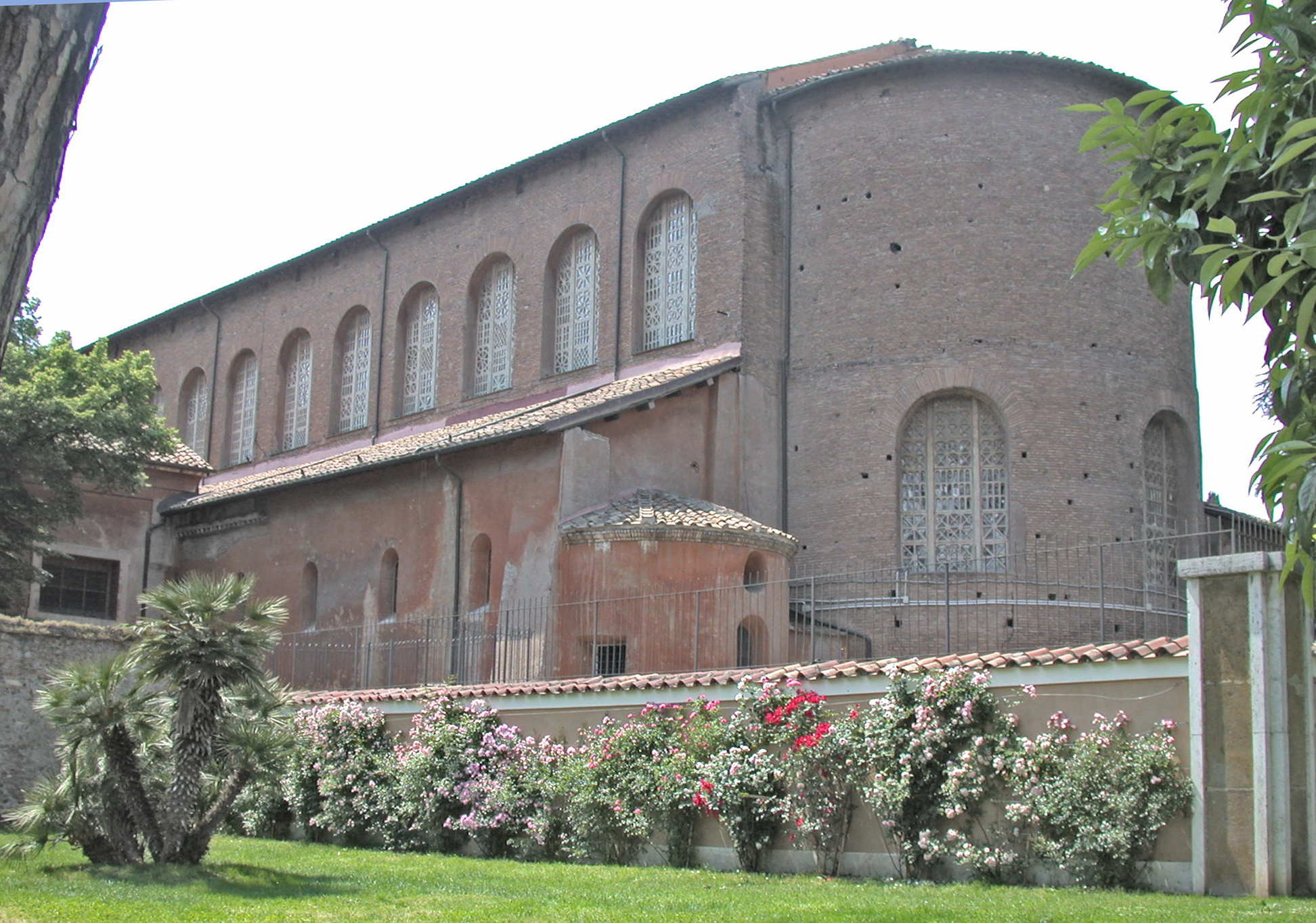 Roma, chiesa di Santa Sabina, esterno (fianco destro e abside), dal giardino degli Aranci